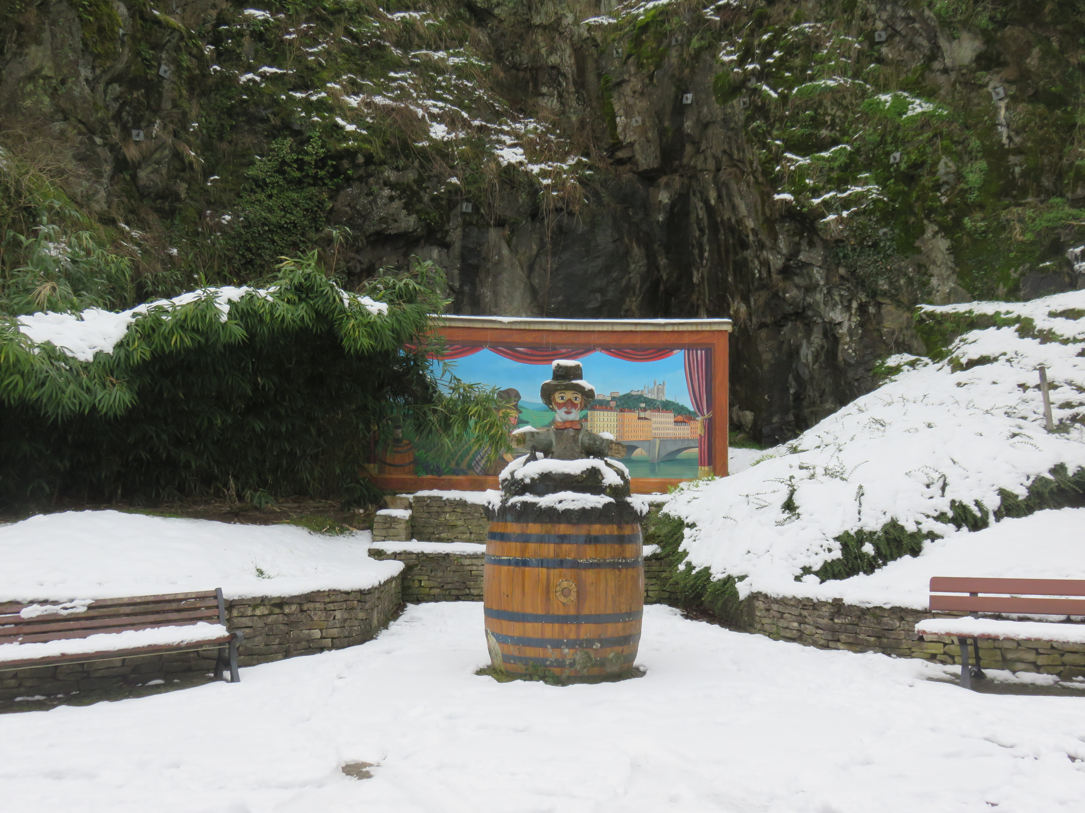 Statue de Gnafron à Beaujeu (Rhône, France).